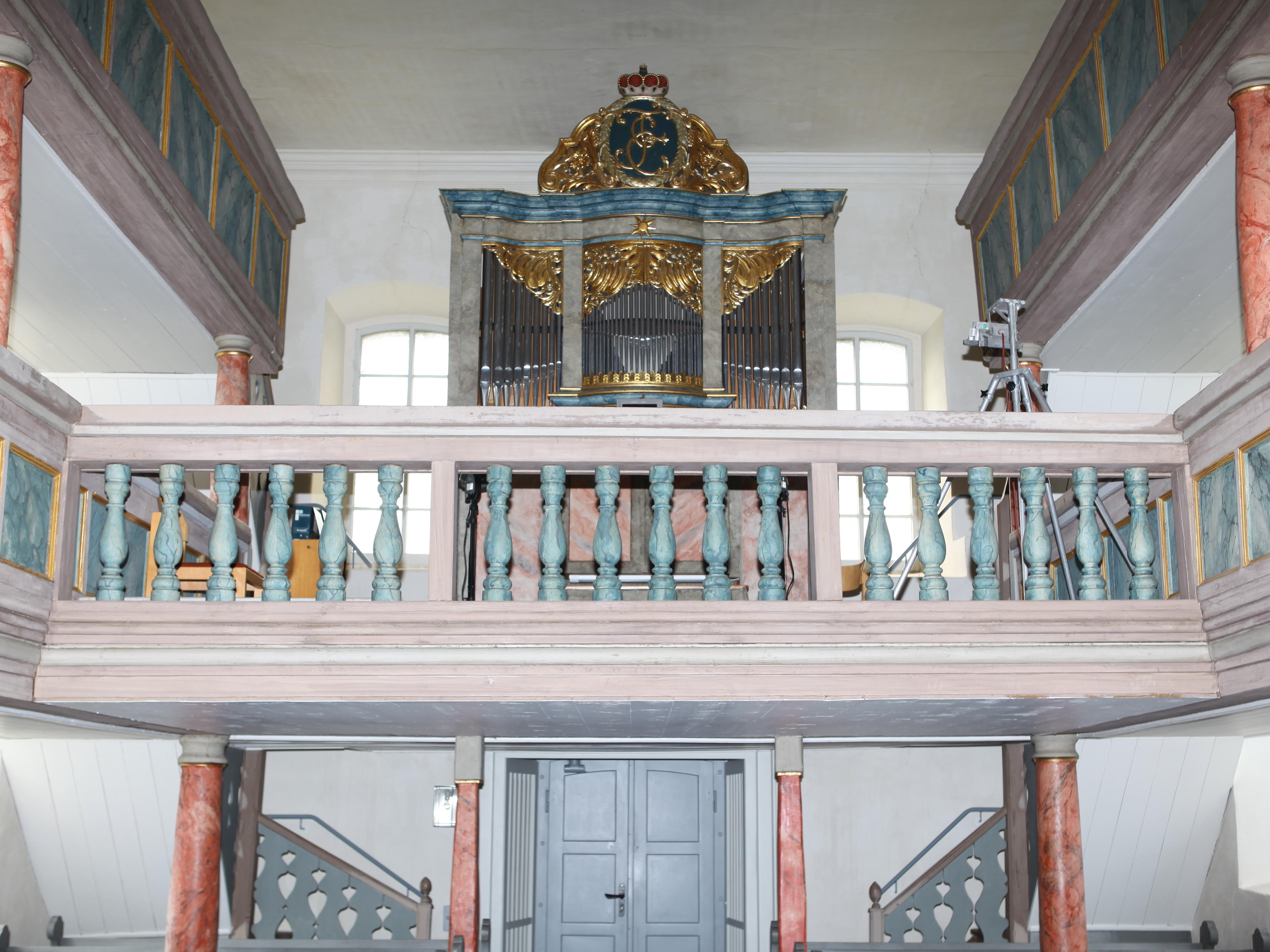 Rottenbach St. Matthäus